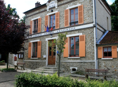 La mairie